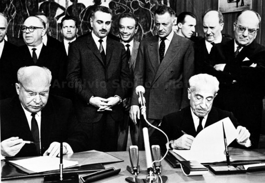 Fotografia di gruppo. In primo piano, seduti al tavolo delle trattative, Aleksandr Tarasov e Vittorio Valletta per la realizzazione di un complesso produttivo a Togliattigrad. In secondo piano, tra gli altri, l'avvocato Gianni Agnelli, Torino (Fiat Group Marketing & Corporate Communication spa, Archivio e centro storico Fiat, Archivio iconografico, Accordi, b. AC 5)